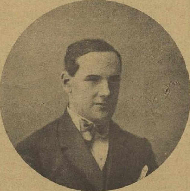 Ladislav Machoň (1888-1973), český architekt